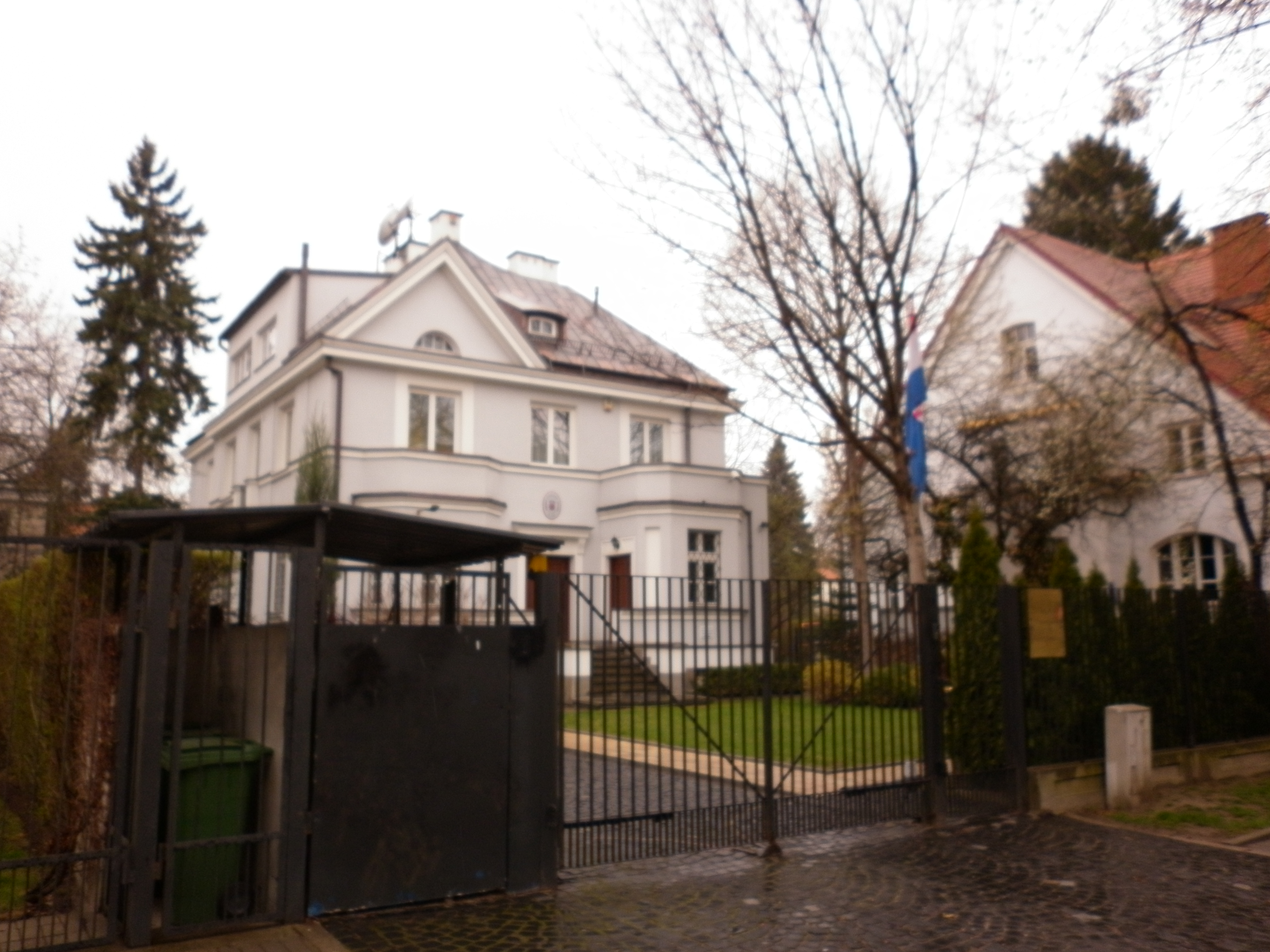 Ambasada Chorwacji w Polsce